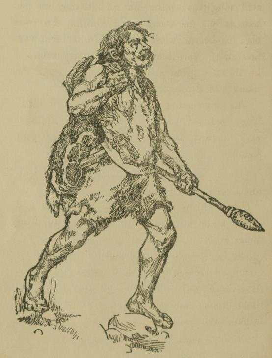 Jager út de Stientiid (tekening begjin 20e ieu).